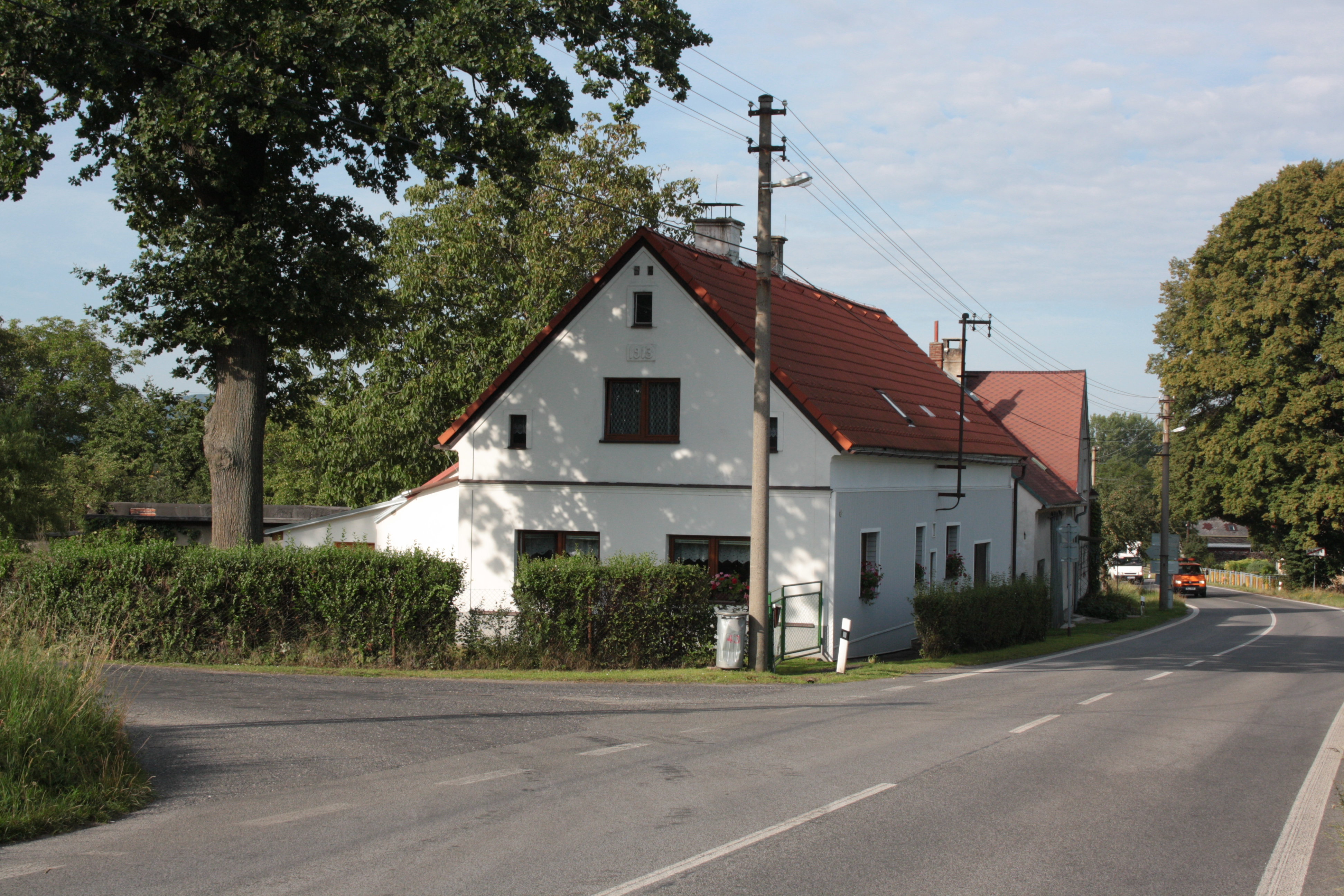 This photograph was taken with a DSLR from WMCZ's Camera grant. Dům číslo popisné 43 v Hajništi u Nového Města pod Smrkem.